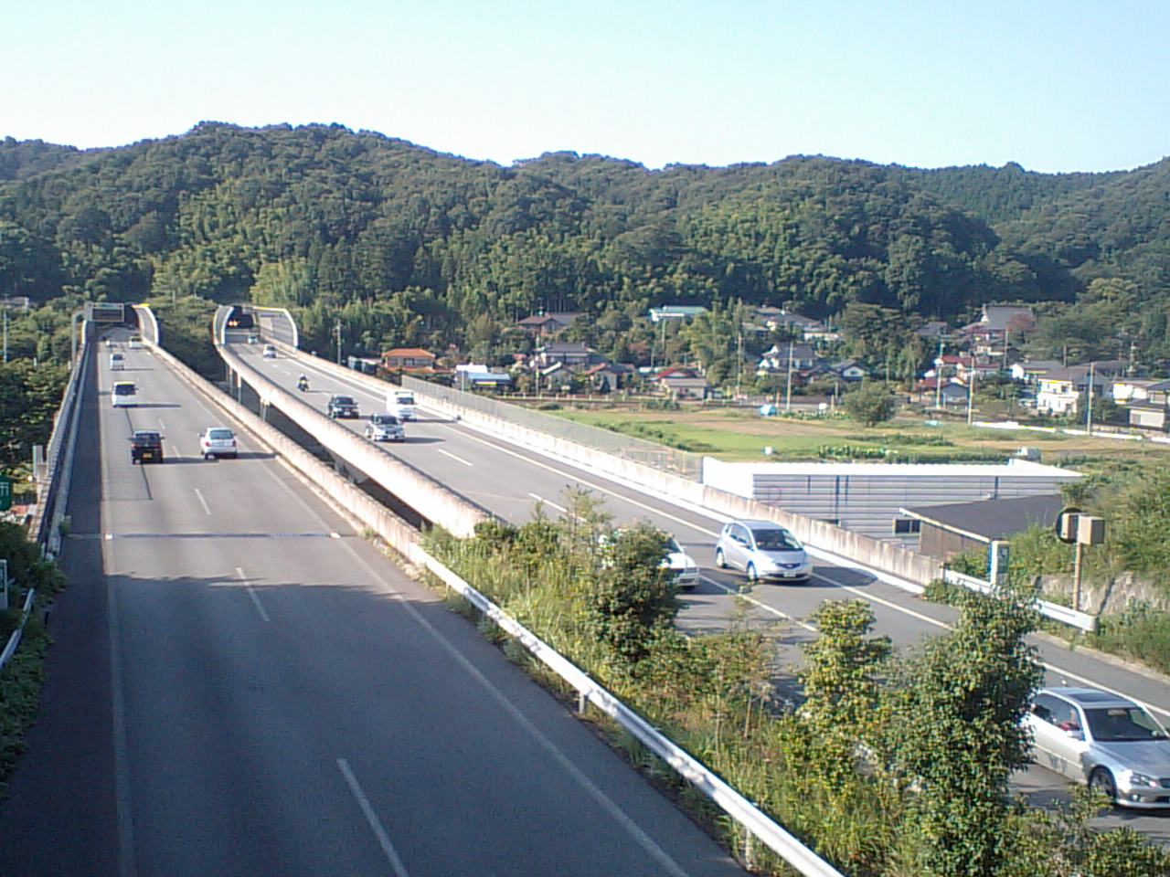 圏央道、日の出インター付近